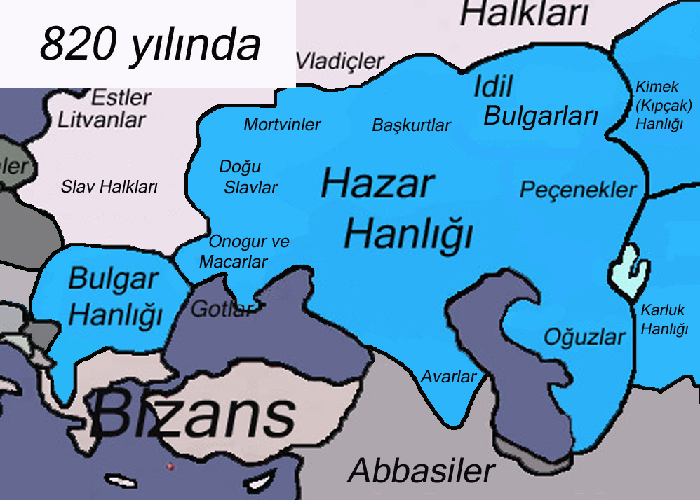 Kaynak: Jean-Paul Roux'un Türklerin Tarihi (İSBN 975-997-091-0) adlı kitabındaki tariflerine göre kendim ürettim. Kategori:Türk tarihi